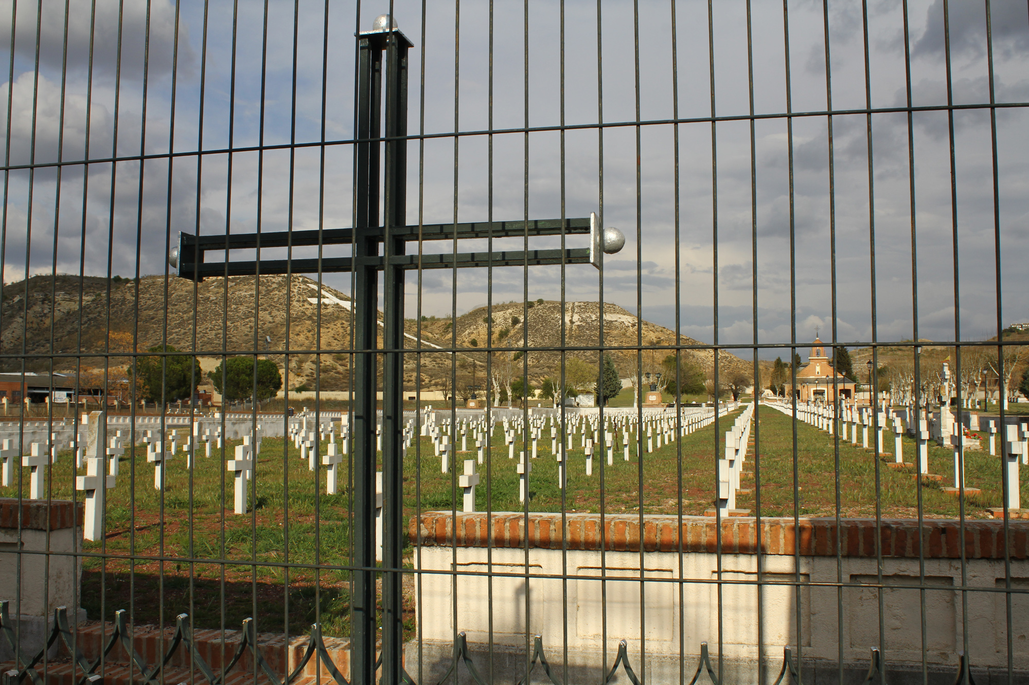 Cementerio de los Mártires de Paracuellos de Jarama, en Madrid. Este cementerio está formado por varias fosas comunes en las que fueron sepultados miles de personas asesinadas por el bando republicano en el otoño de 1936, durante la Guerra Civil Española. Los asesinados lo fueron por motivos tales como ser católicos, monárquicos, derechistas, falangistas, militares o empresarios. Martyrs Cemetery of Paracuellos Martyrs Cemetery of Paracuellos de Jarama, in Madrid. This cemetery is made up of several mass graves in which were buried thousands of people killed by the Republican side in the fall of 1936, during the Spanish Civil War. Those killed were for reasons such as being Catholic, monarchist, rightist falangist, military or businessman.